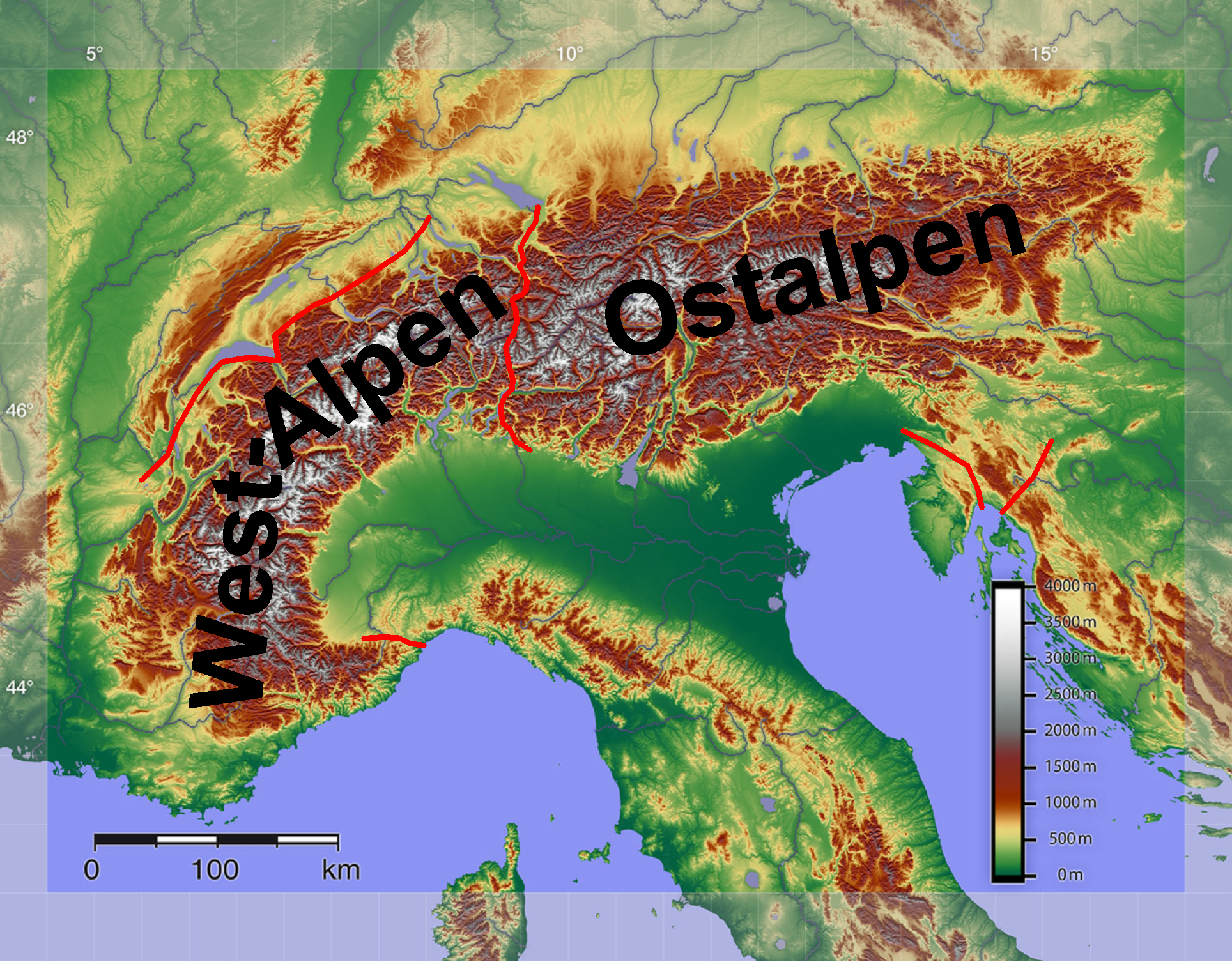 Aufgliederung der Alpen sowie die Abgrenzung zu umgebenden Gebirgen